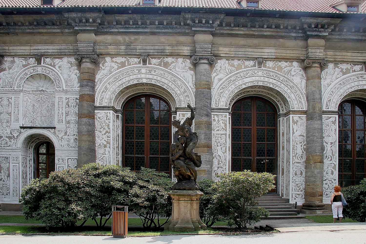 Královská zahrada, Míčovna - průčelí, Prague Castle